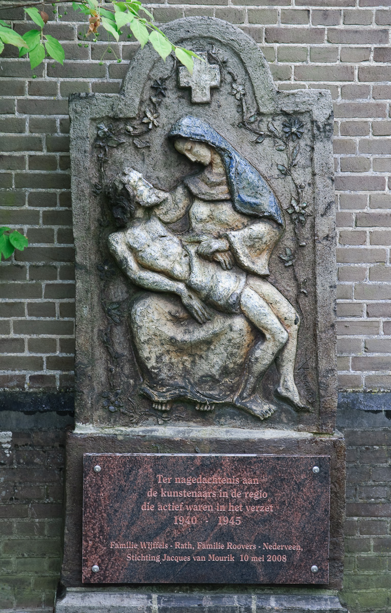 Peter Roovers Pieta (verzetsmonument) – keramiek (557), Kerktuin Peter Roovers, Pieta, keramiek, verzetsmonument in Kerktuin naast Gemeentehuis Mook